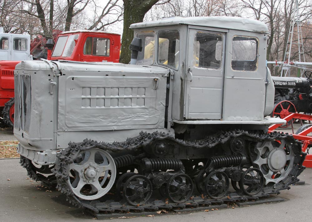 Трактор Т-74 в Саратове на Соколовой горе